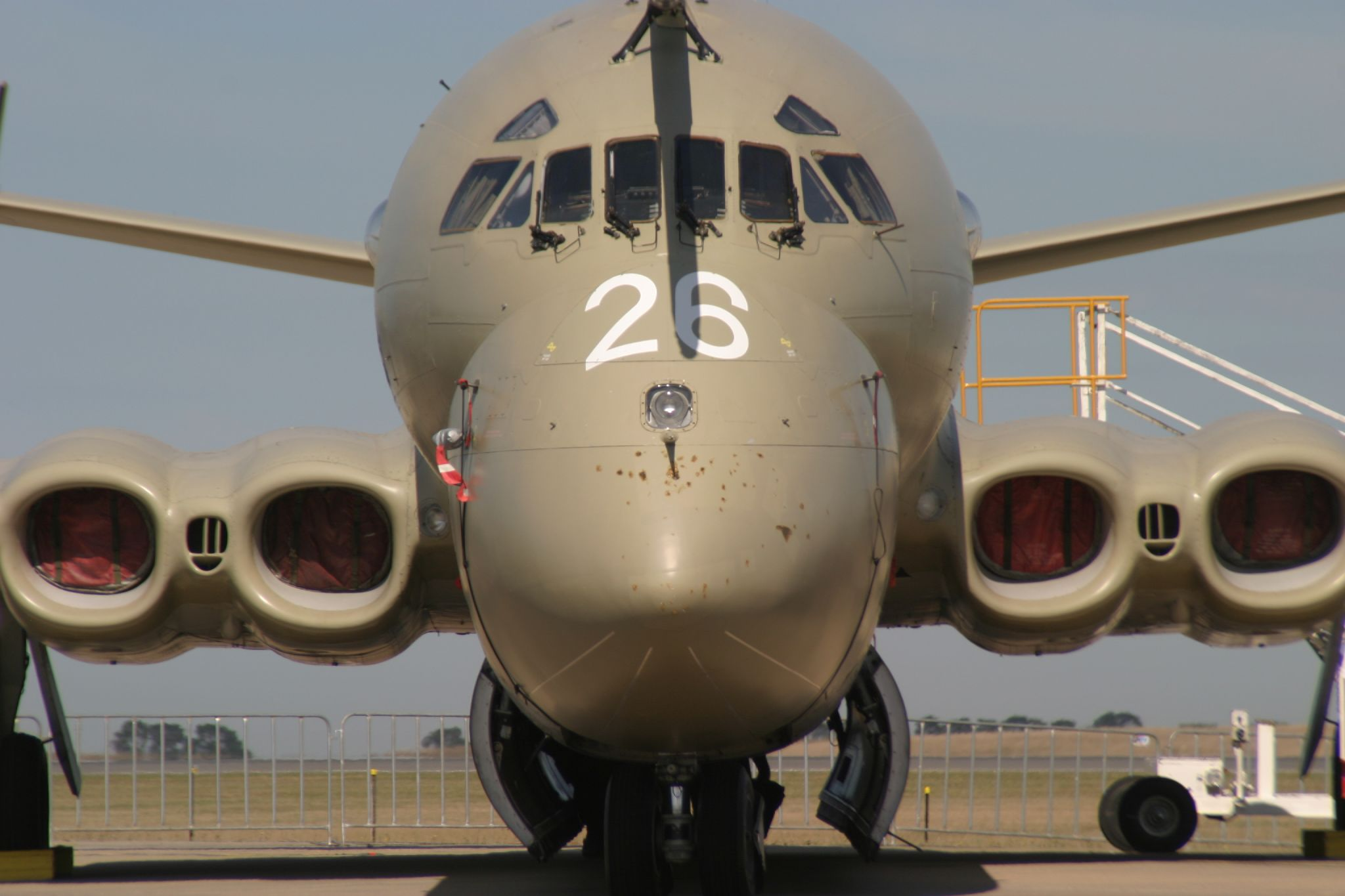 Hawker-Siddeley/BAE Nimrodtanker